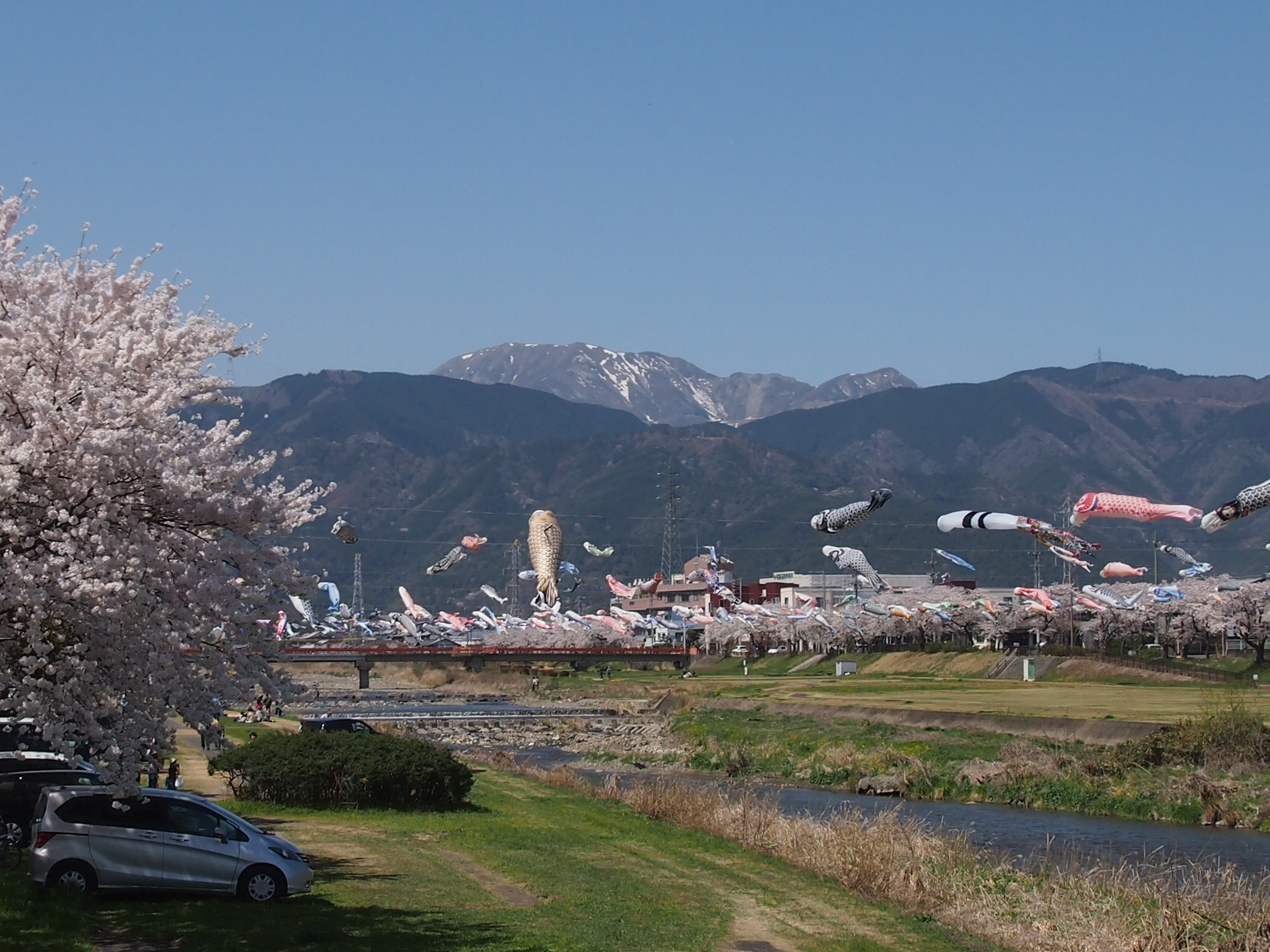 相川水辺公園（相川橋上）